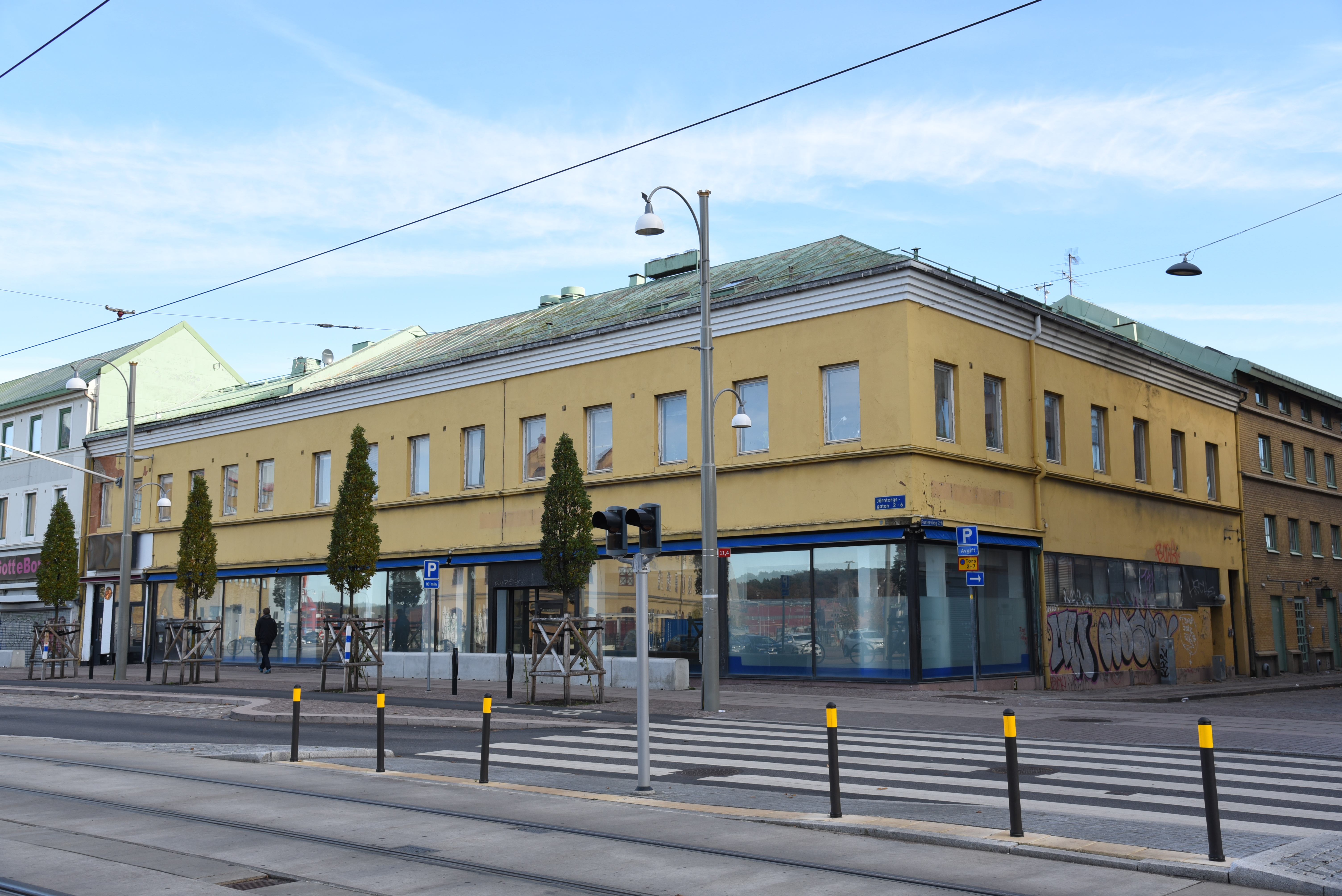 Järntorgsgatan 4-6 - Pusterviksgatan 2 i 3 kvarteret Röda Bryggan i stadsdelen Pustervik i Göteborg. Huset uppfört omkring 1860. I huset fanns tidigare Tempo, Sjögrens järnhandel och Nordea.